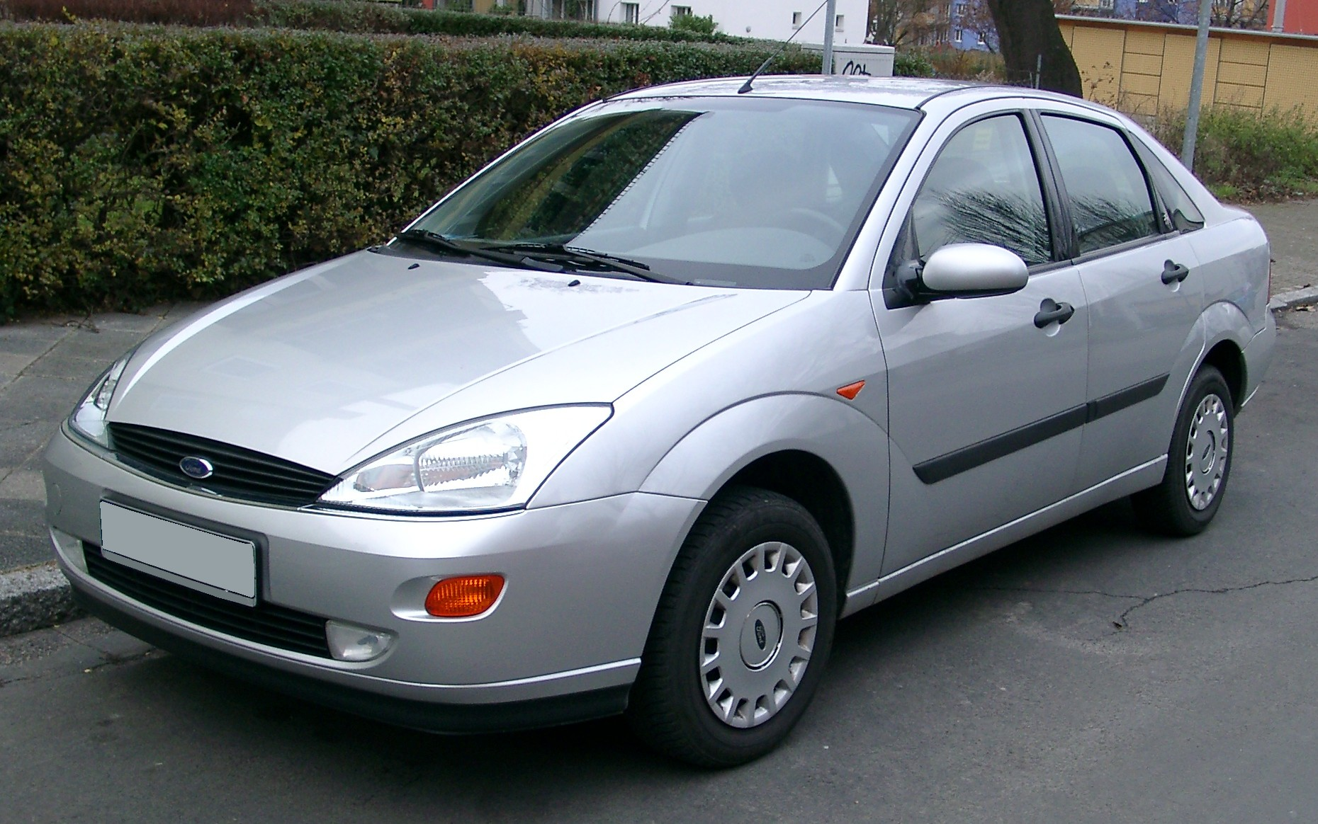 Ford Focus Stufenheck, 1. Generation